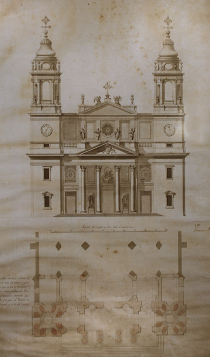 Fachada de la catedral de Pamplona de Ventura Rodríguez.